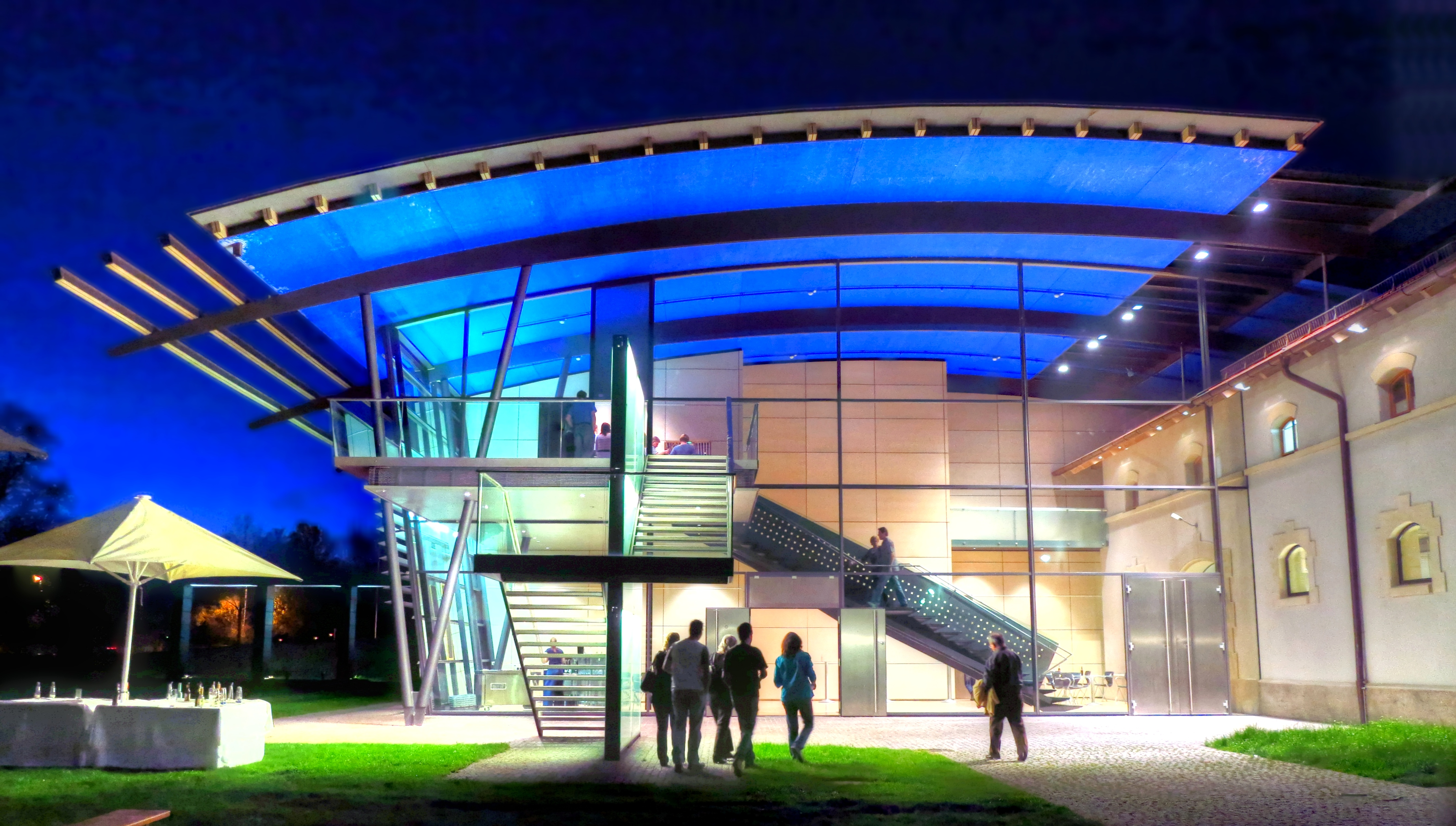 Deutschland, Bayern, Oberbayern, Landkreis Fürstenfeldbruck, Kloster Fürstenfeld, Veranstaltungsforum, Stadtsaal, gesehen von den Amperauen